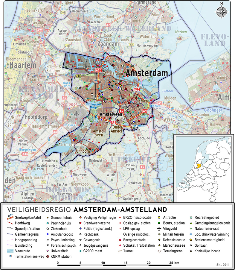 Veiligheidsregio Amsterdam-Amstelland, met indeling van gemeenten (2011) en impressie van het landschap. Door Jan-Willem van Aalst, samengesteld uit publiek beschikbare geo-data: Referentie-ondergrond (kustlijn, steden, wegen) gerasterd uit de OpenStreet Map OSM. ( Inhoud is beschikbaar onder de Creative Commons Attribution-ShareAlike 3.0 license. Referentie-ondergrond op water bewerkt vanuit Gebruik is vrij met bronvermelding NLR en ESA. Vectorgrenzen van gemeenten en regio's vrij ter beschikking gesteld met dank aan cartografen van brandweerregio's Hollands-Midden en IJsselland; gerasterd in Adobe Photoshop. Grenzen en kazernes in Duitsland en België vrij ter beschikking gesteld met dank aan Meldkamer Oost-Nederland, Regio Limburg-Noord en Regio Midden- en West-Brabant Hoogte-aanduidingen (reliëf) gerasterd uit de AHN Viewer ( gebruik is vrij met bronvermelding (c) AHN, BRZO risicolocaties, LPG risicolocaties, buisleidingen: op basis van de Risicokaart, Defensie locaties op basis van de lijst op Locaties C2000 masten op basis van Penitentiaire locaties op basis van Rijksoverheid site Recreatieve verblijfslocaties op basis van gebruik is vrij met bronvermelding "(c) Kenniscentrum Recreatie". Natuurreservaten op basis van Kilometerpalen (iedere 5 km) op basis van Stichting Incident Management Nederland ( vrij bruikbaar met bronvermelding Overige kenmerken op de kaart: eigen tekenwerk van Jan-Willem van Aalst, op basis van OpenStreet Map en gerasterde CBS gemeentegrenzen.